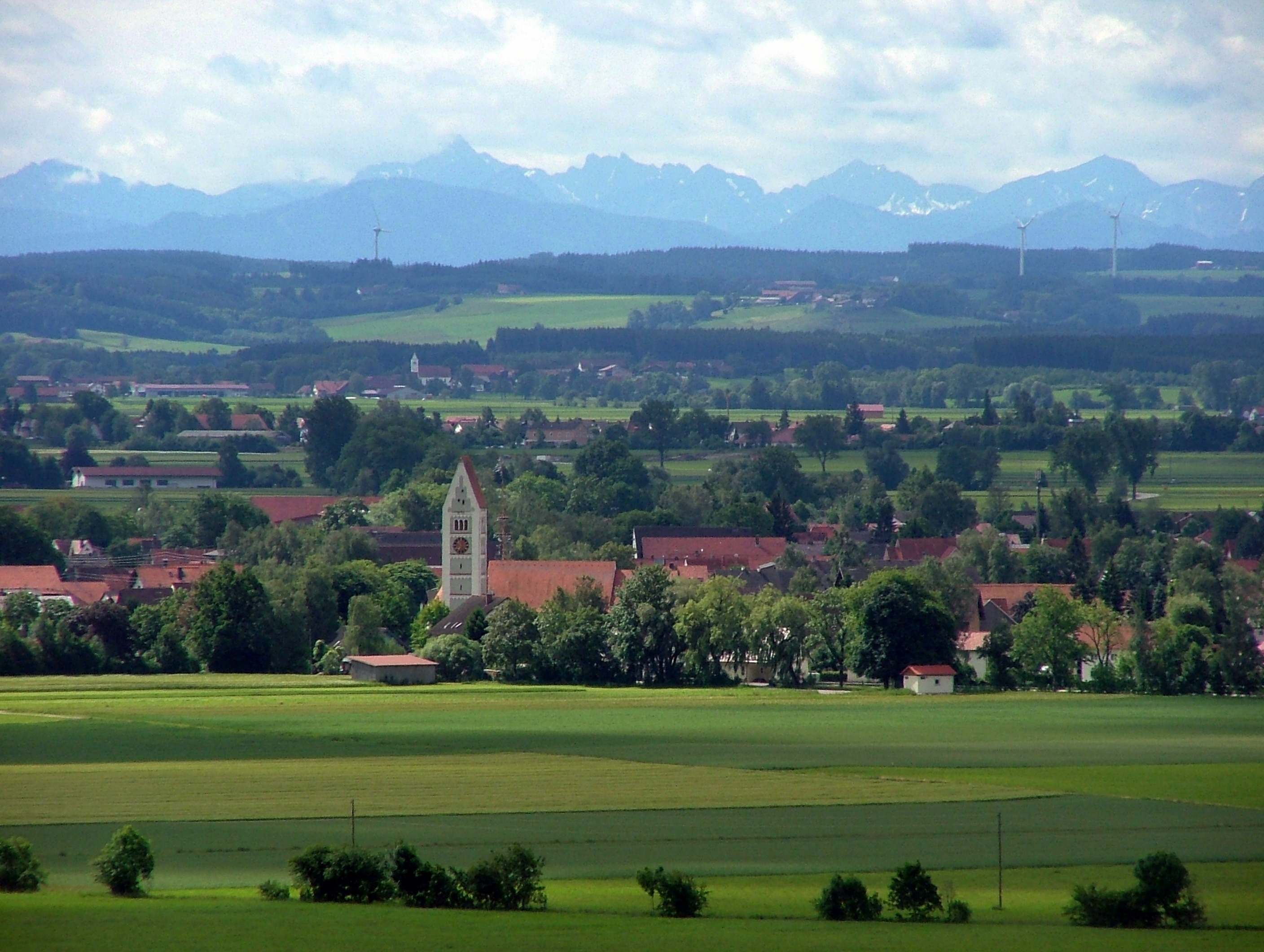 Erkheim